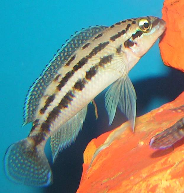 Adult Julidochromis dickfeldi in an aquarium